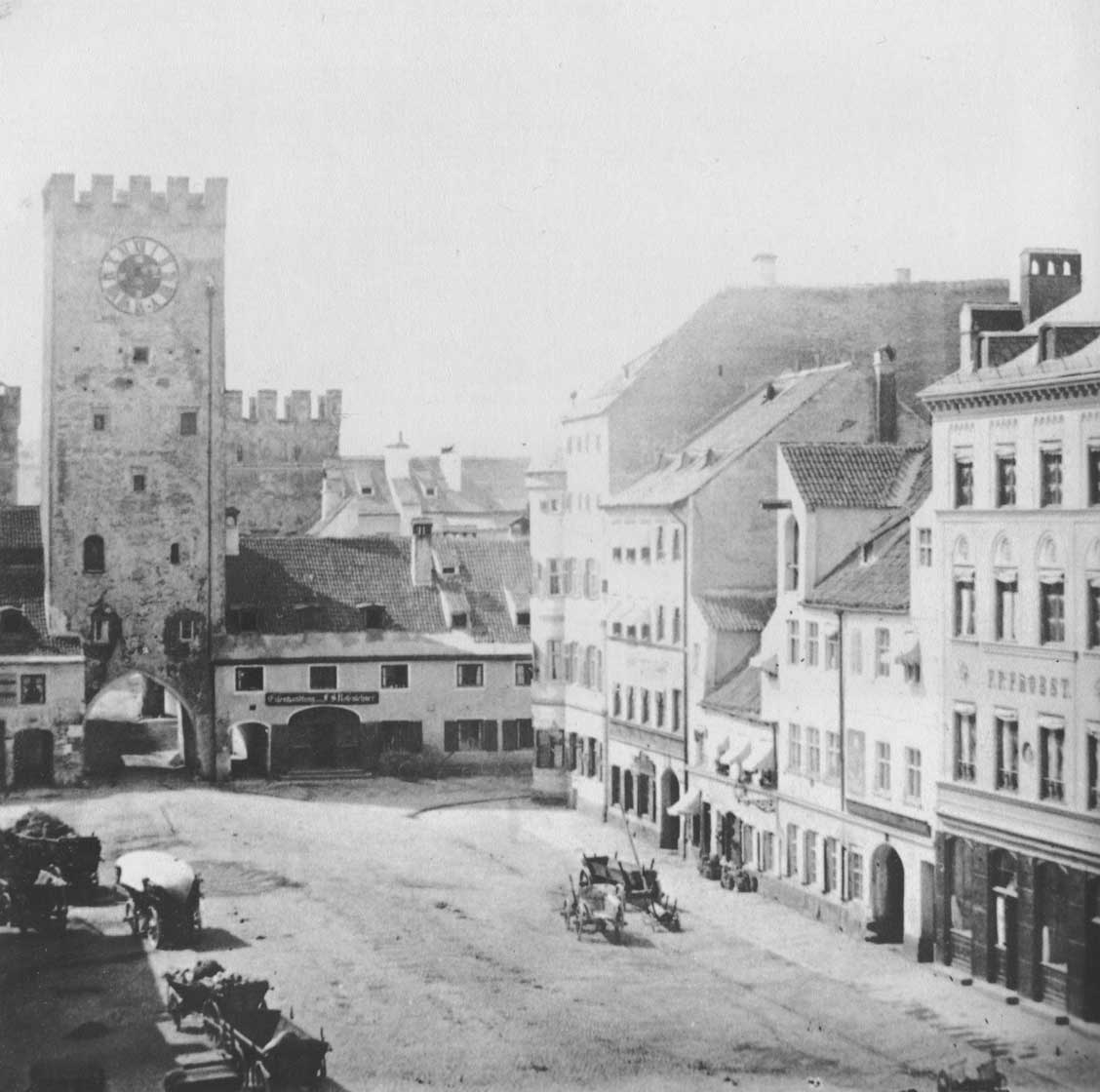 Das Karlstor kurz vor der Zerstörung seines Nebenhauses durch eine Pulverexplosion